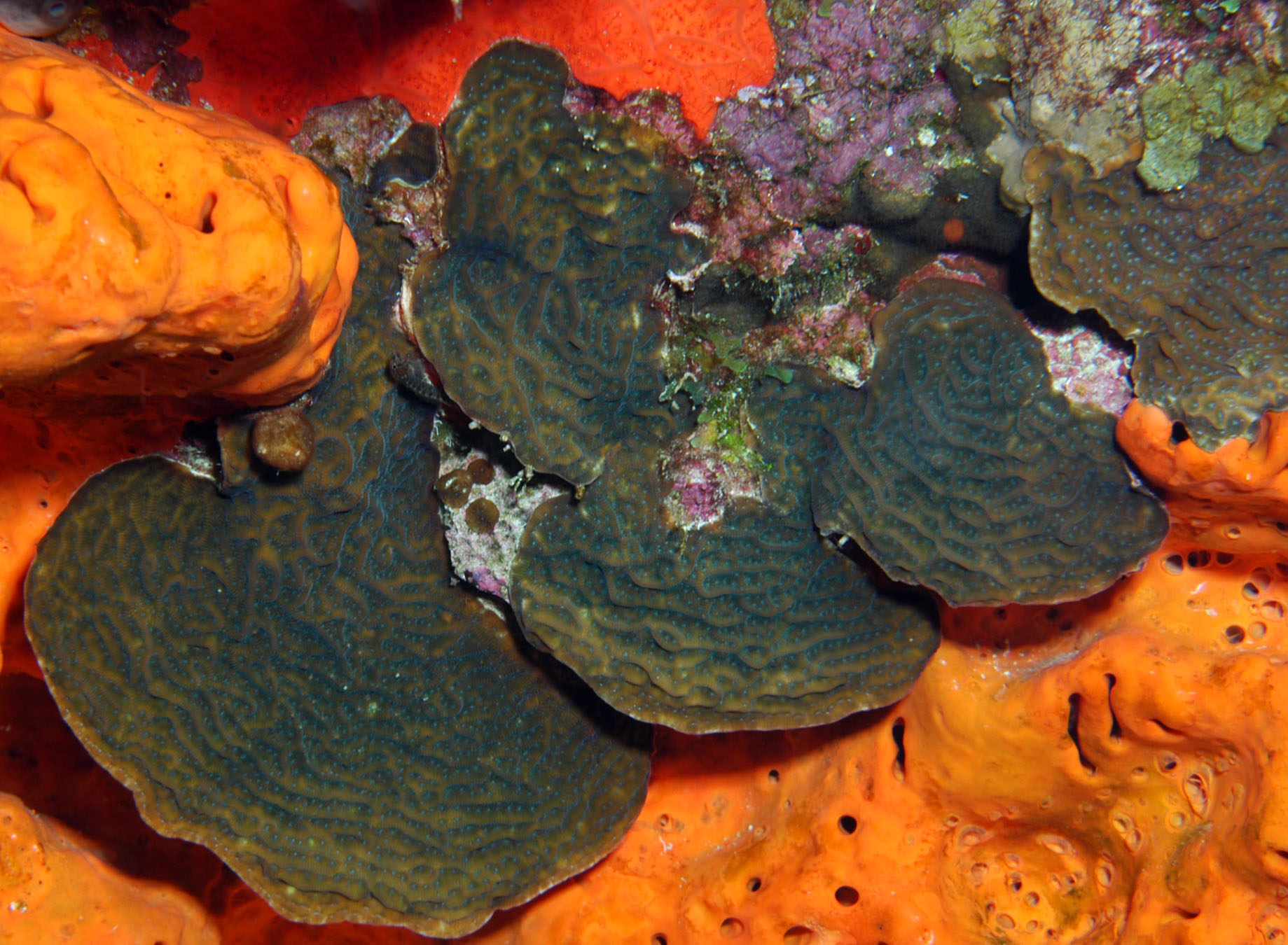 Agaricia fragilis en el Santuario Nacional Marino de Flower Garden Banks, EE.UU.